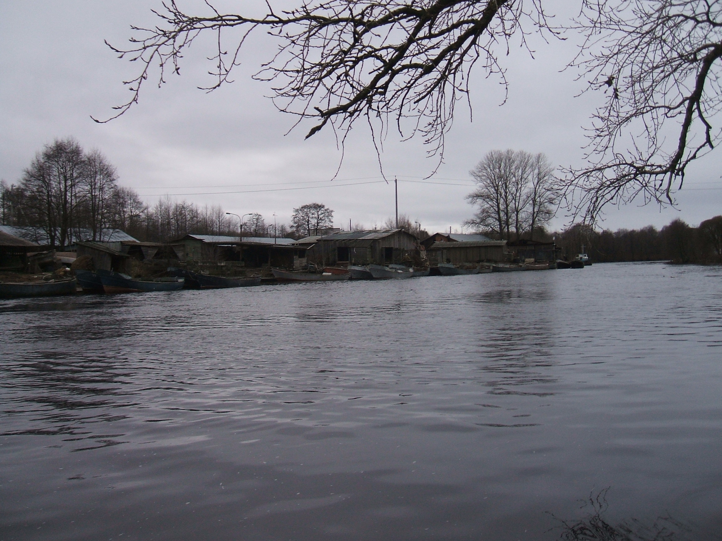 Сестрорецк СПб Парк Дубки Водосливной канал "Шипучка"